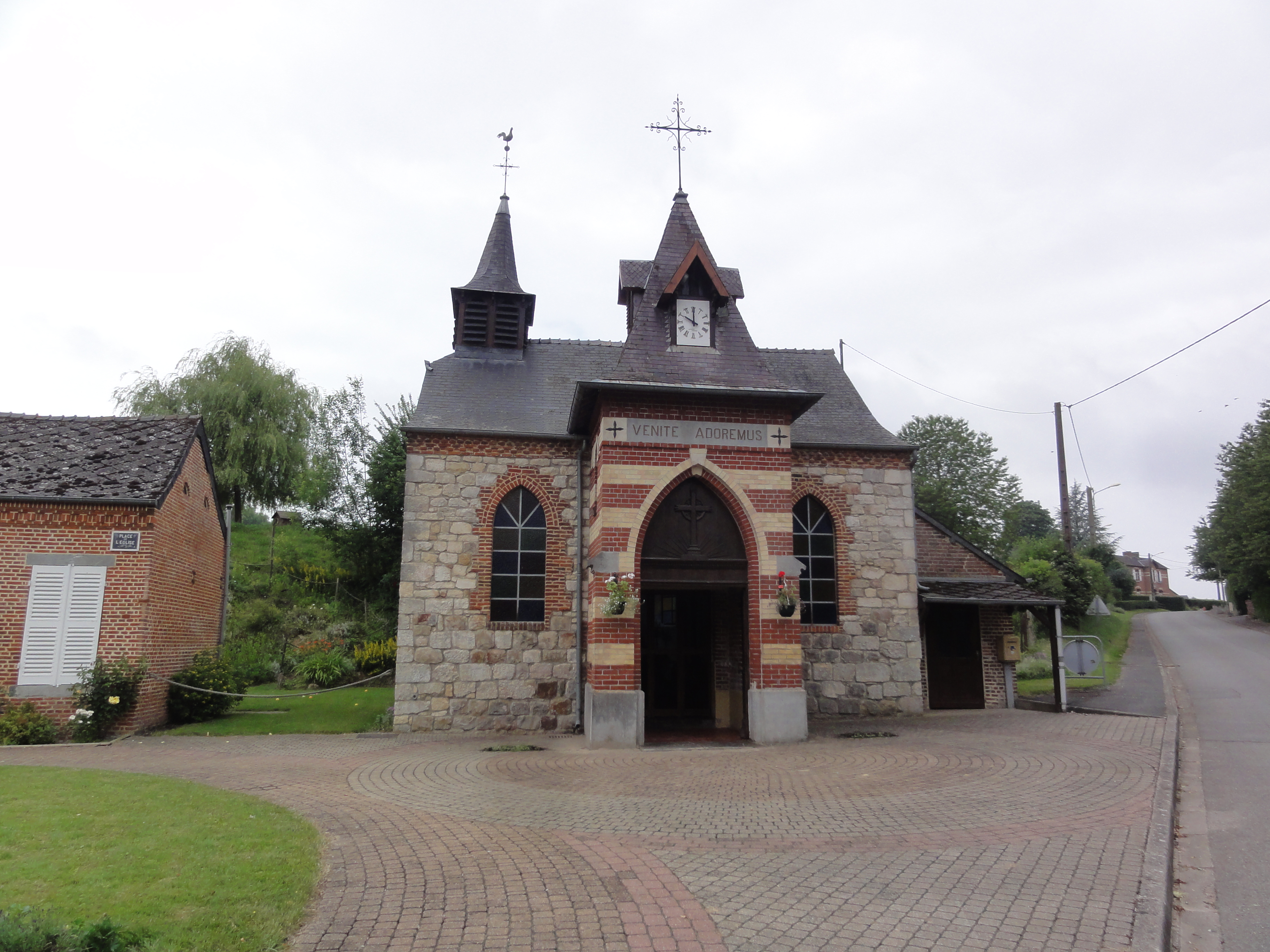 Éparcy (Aisne) église Saint-Martin